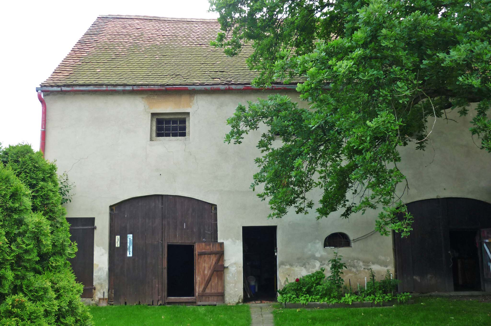 Ehemalige Synagoge in Liebeschitz bei Saaz (jetzt Stall). Die Jüdische Gemeinde in Liebeschitz bestand bis 1931.